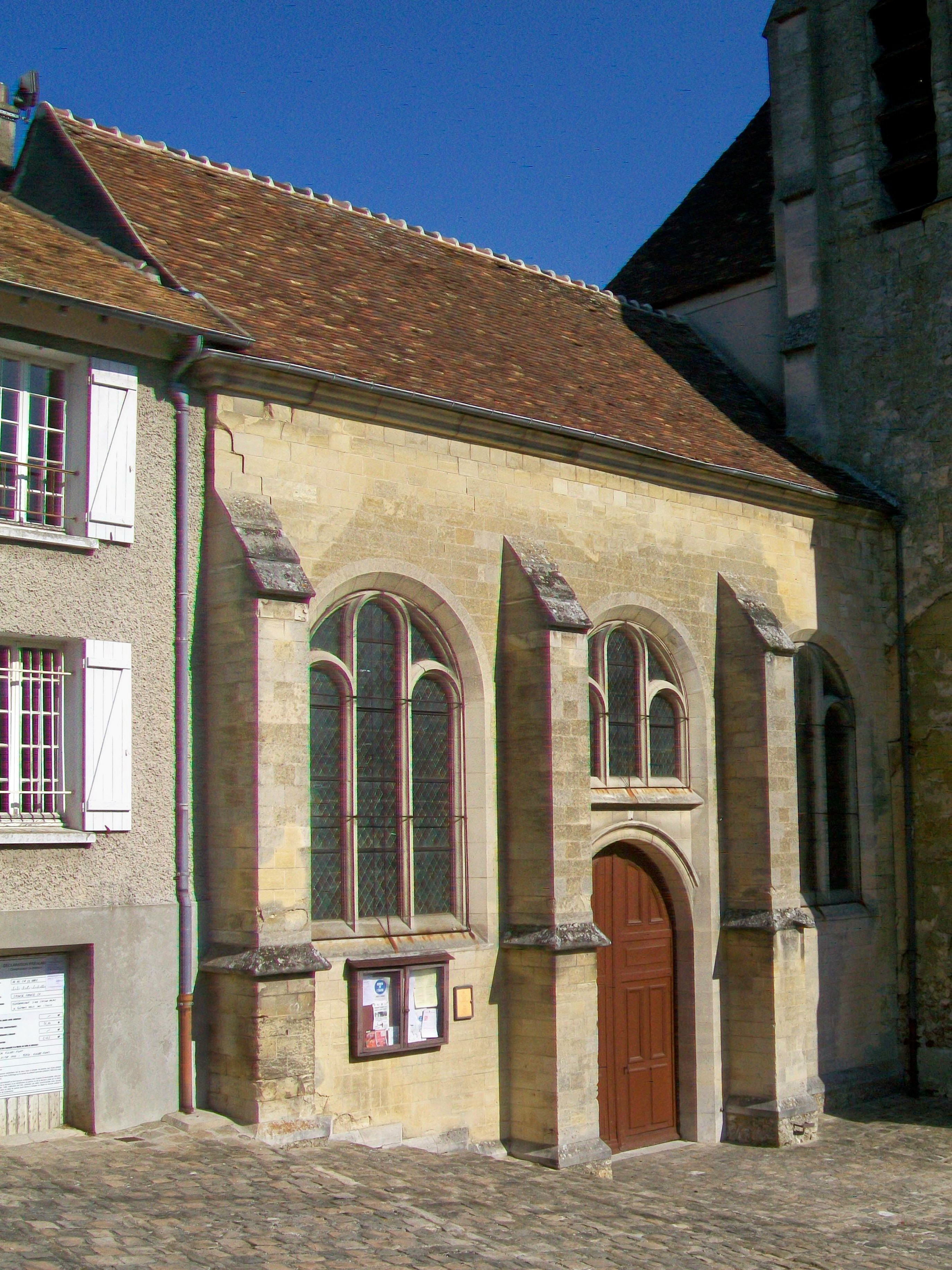 La nef est prolongé à l'ouest par un genre de narthex ou chapelle, qui ne présente que la moitié de la largeur que celle du corps central.